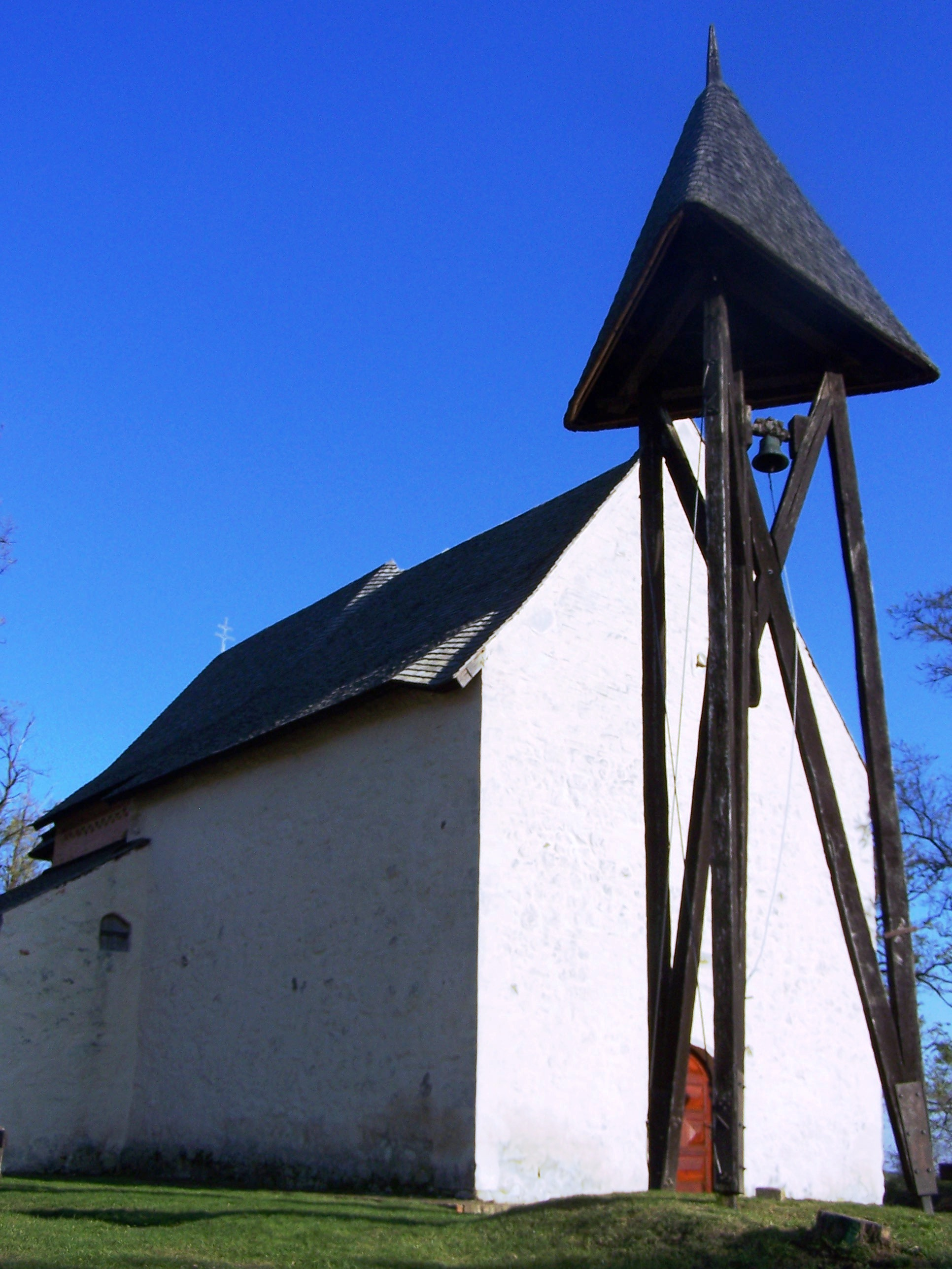 Római katolikus templom (Szent Imre) (Egyházasdengeleg, Temető)